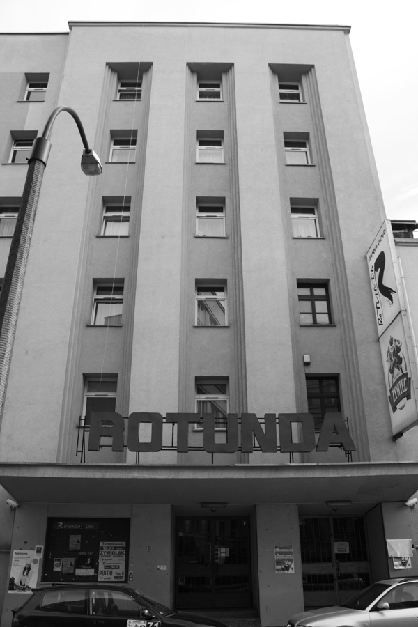 dom studencki "żaczek", Kraków, 2010